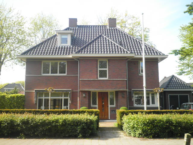 Woning aan de Sportlaan in Hoorn. Pand is in de stijl van het historiserend bouwen: nieuw bouwen in de trant van een oudere bouwstijl.